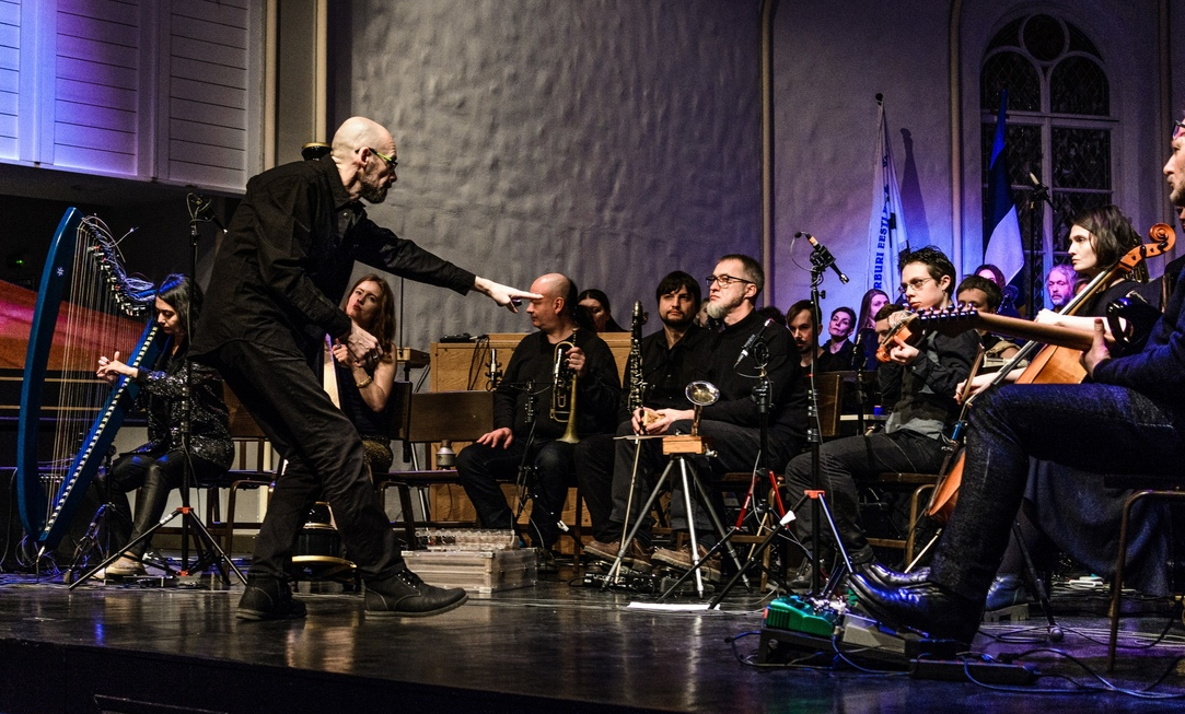 Санкт-Петербургский импровизационный оркестр на сцене Яаникирик, 29 ноября 2018 г.